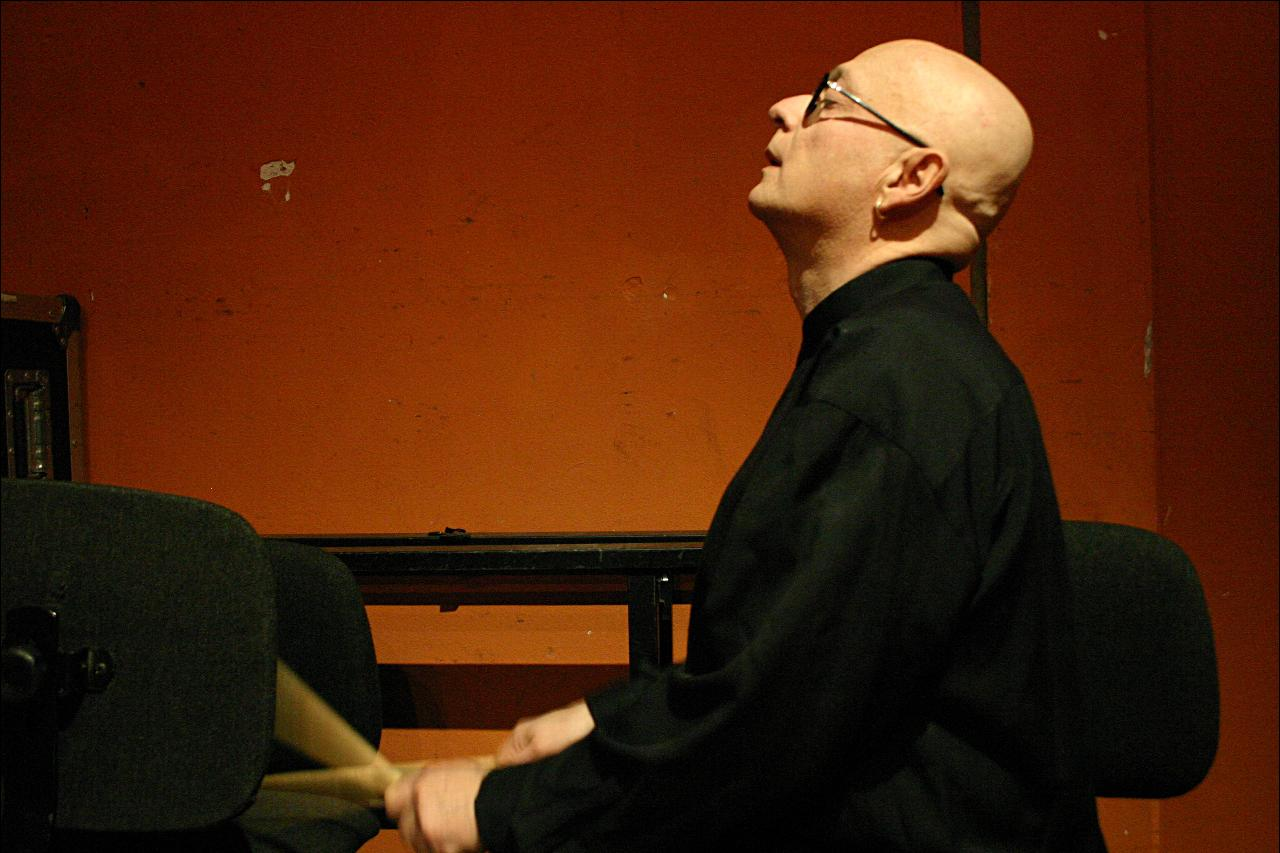 Andrea Centazzo - Mandala Roma - Auditorium